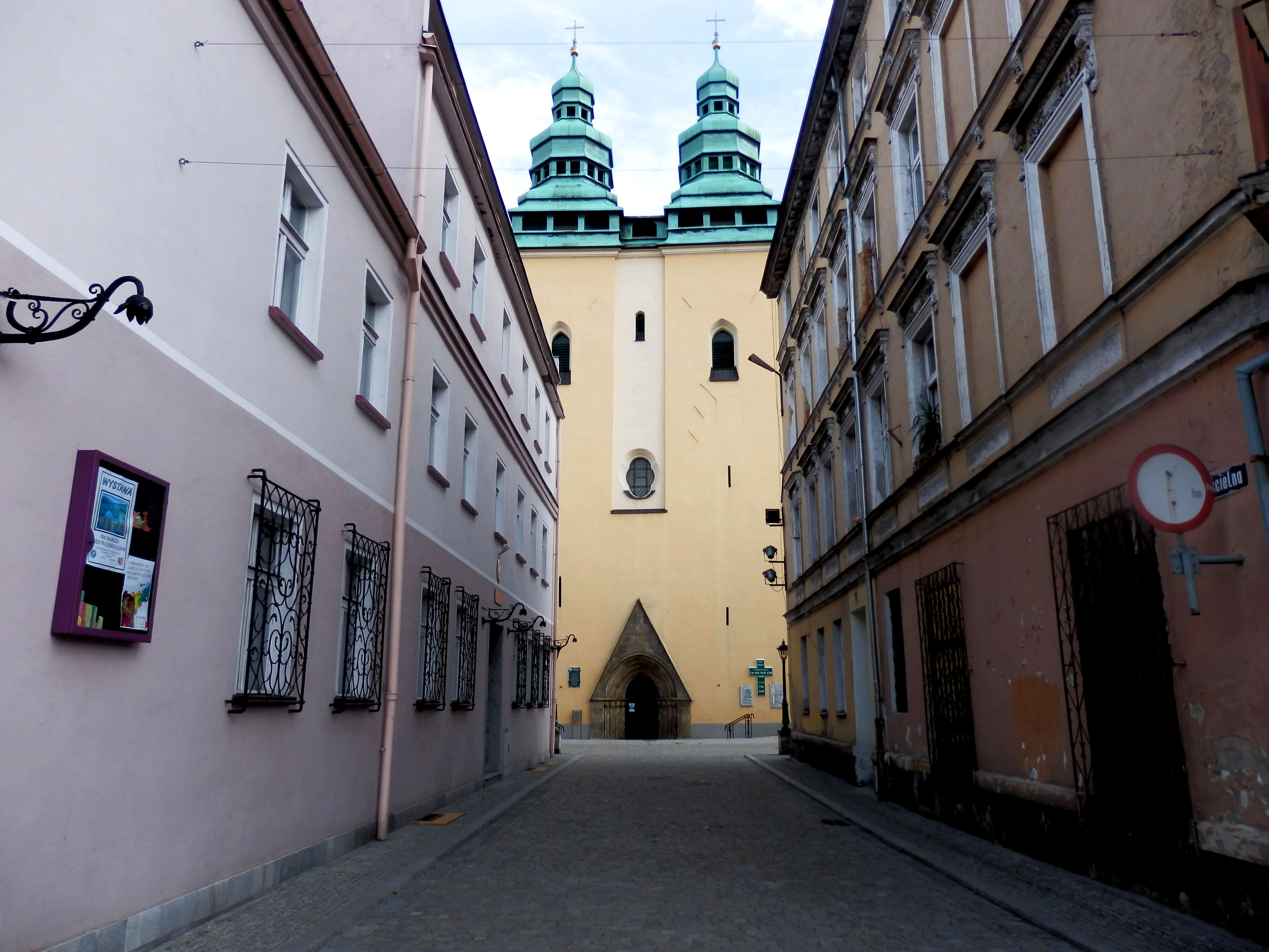 Głuchołazy, kościół par. p.w. św. Wawrzyńca, 3 ćw. XIII, 1729-1731, 1902-1907